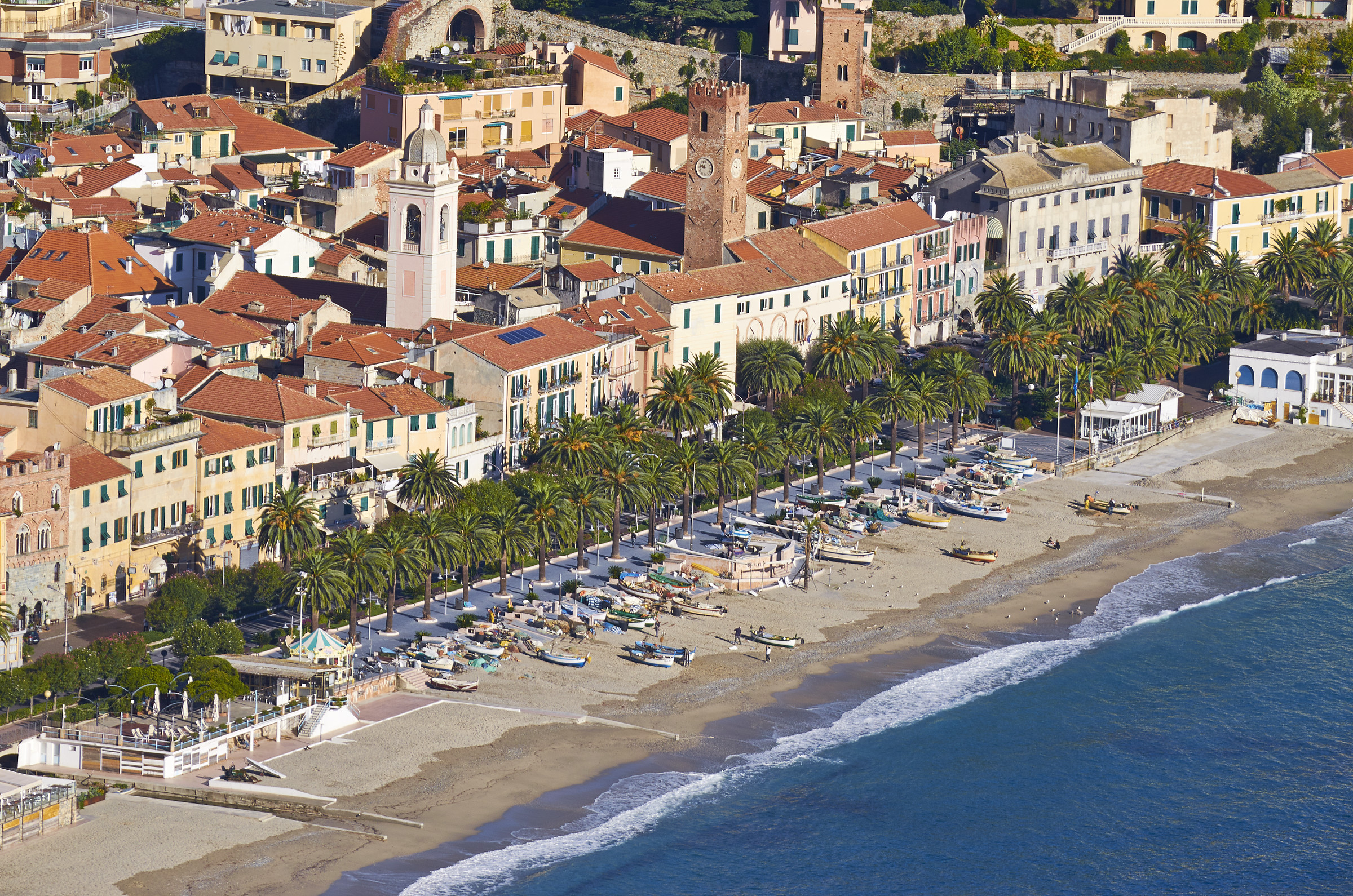 Noli, telefoto